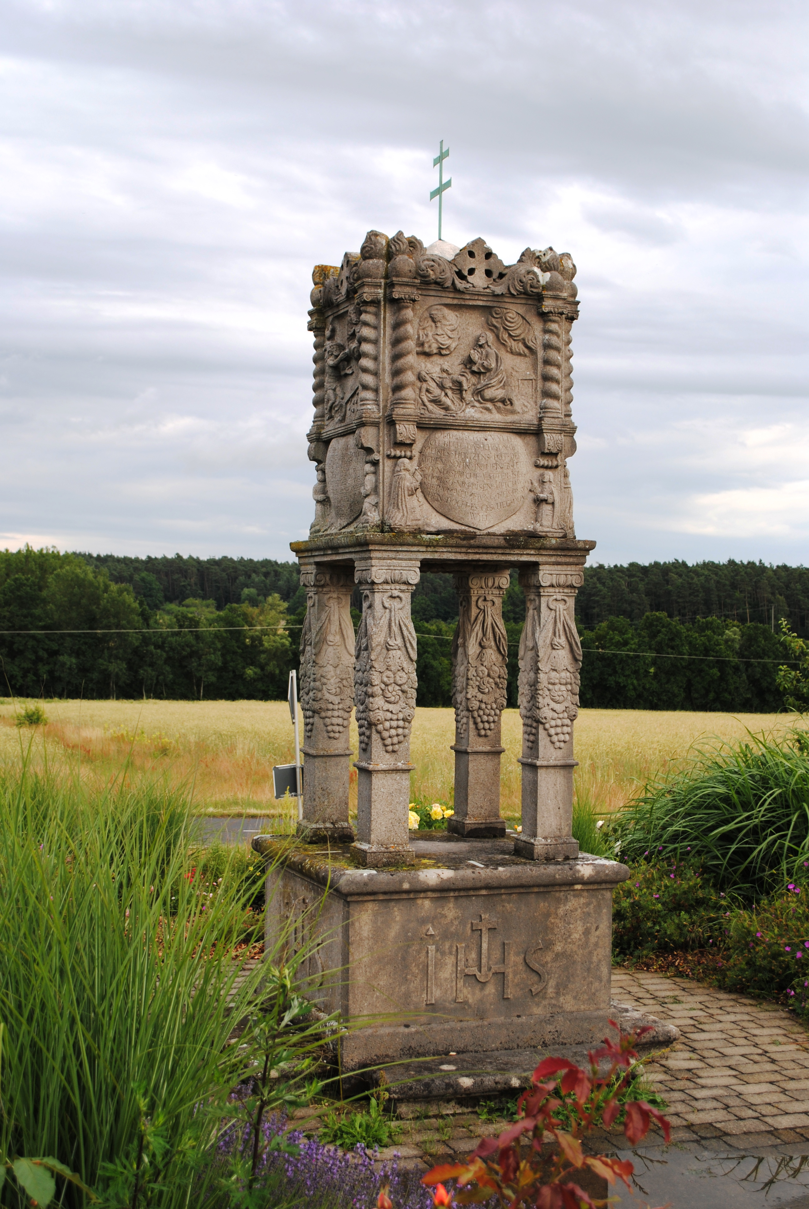 Viersäulenmarter, Sommerach, KT 57, Bildstock, Straßäcker, Sommerach, sogenannter „Viersäulenmarter“ mit Passionsdarstellungen, bez. 1700; erneuert 1948; D-6-75-169-66